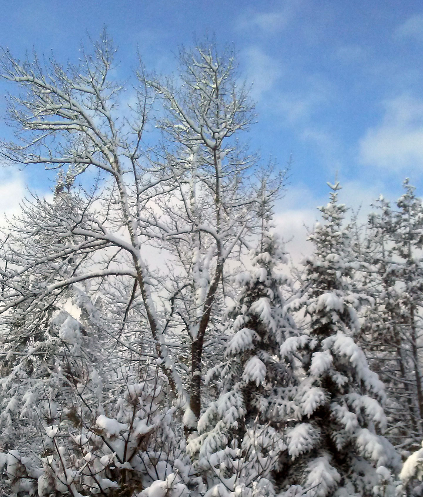 Vu du balcon le matin du premier janvier 2020